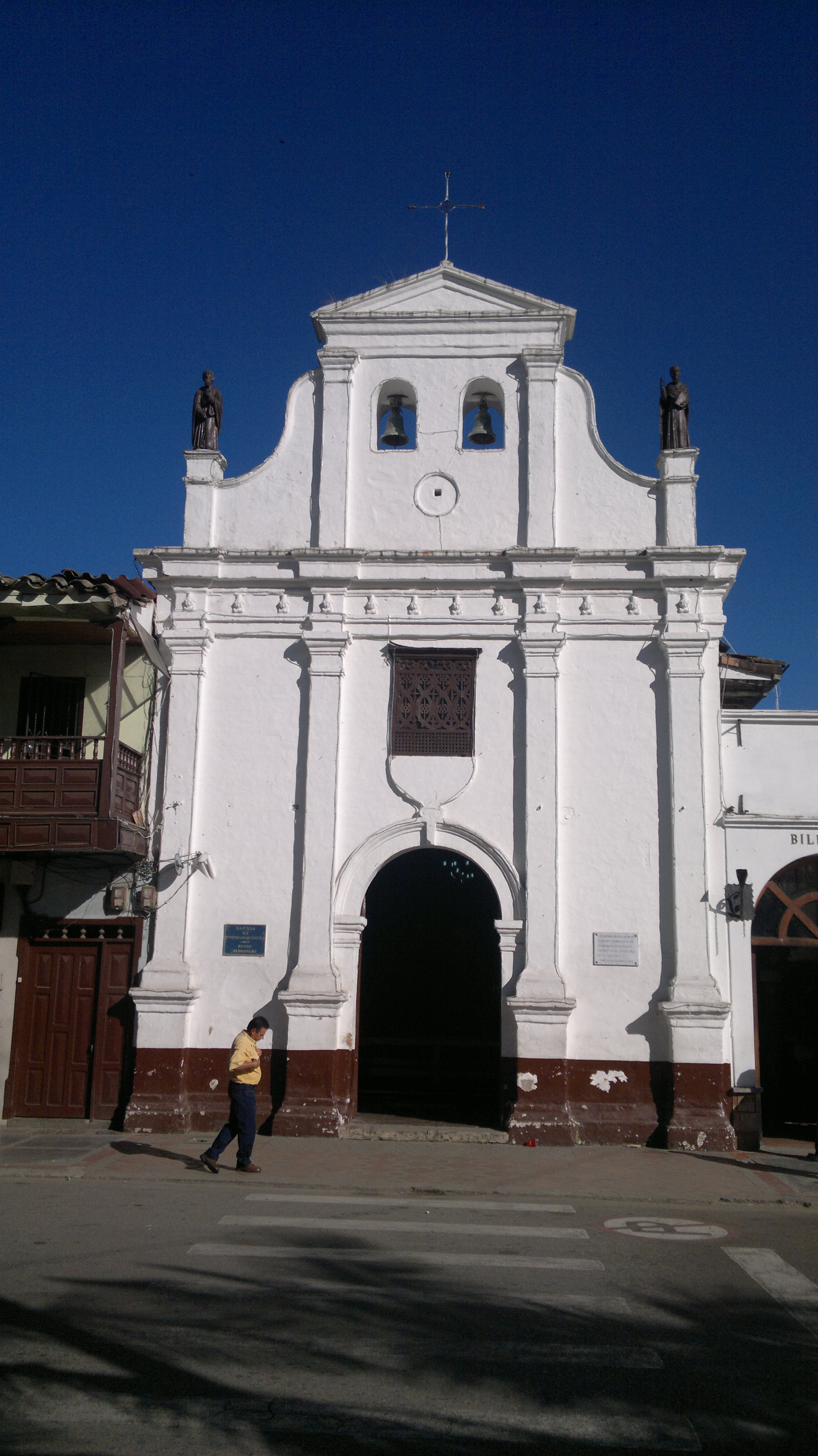 Capilla de Nuestra Señora de Chiquinquirá